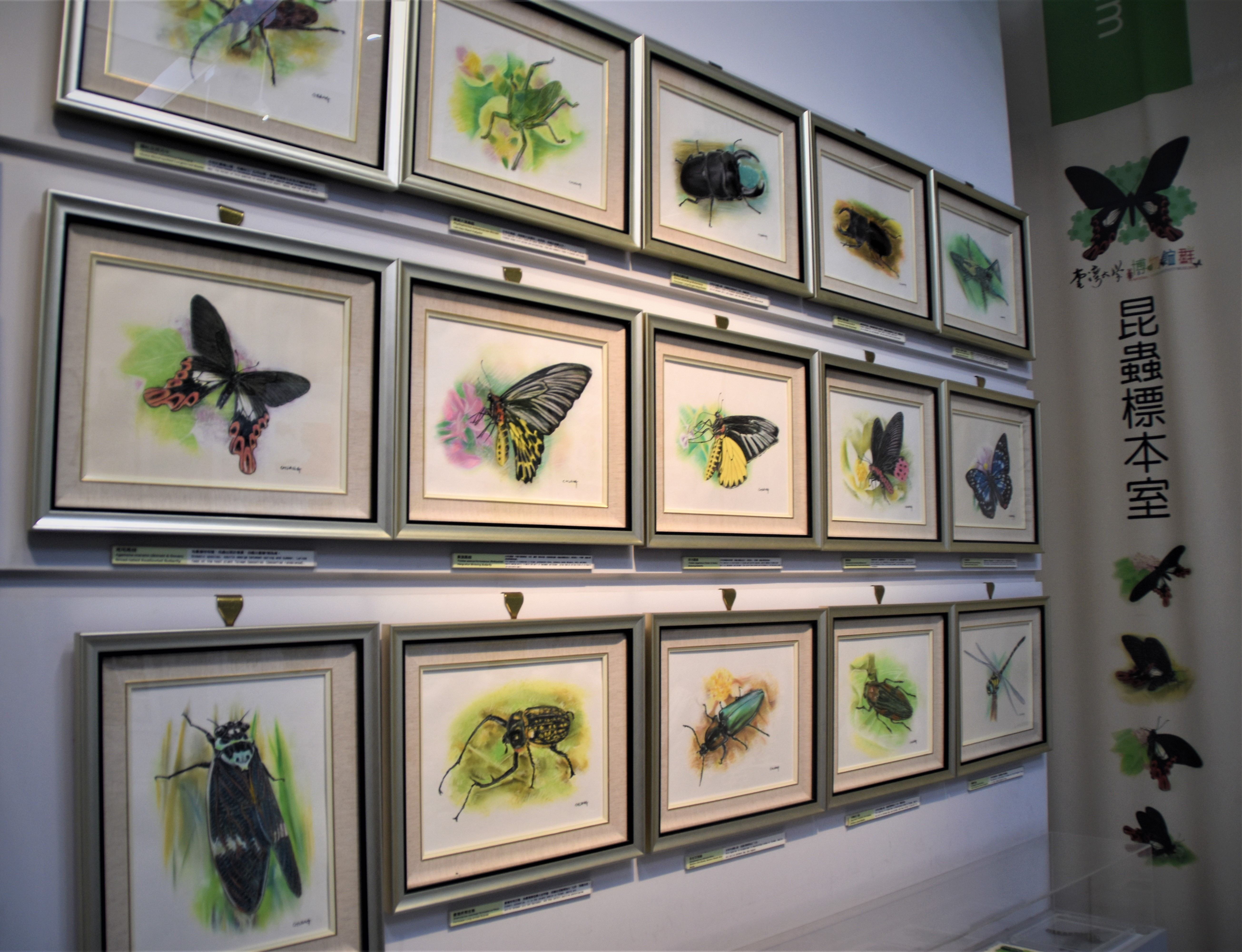 臺大昆蟲館創立於1936年，位於蟾蜍山下，地址為羅斯福路4段113巷27號。昆蟲館為磚造2層樓房，建坪約1,000平方公尺，擁有獨特的歷史。